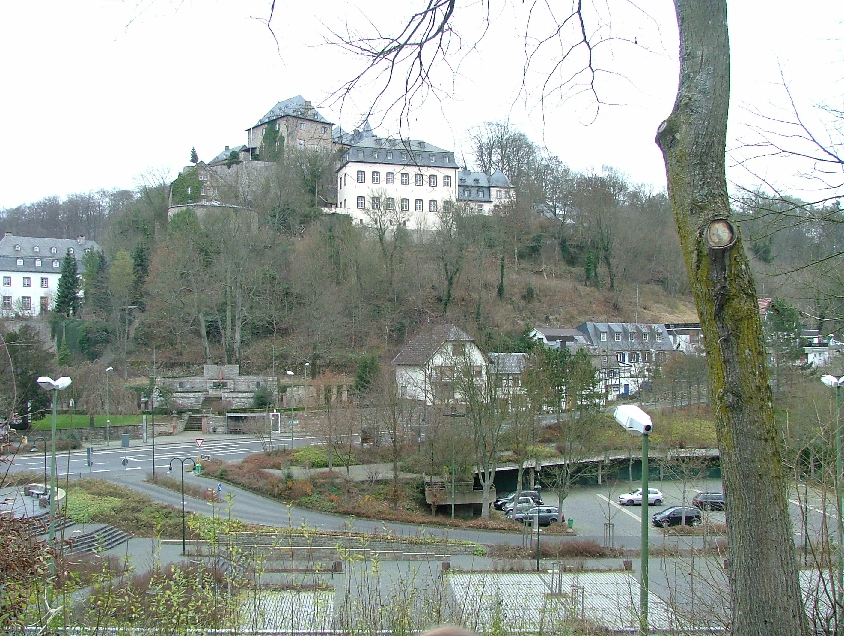 Burg Blankenheim (Ahr), Germany Eigenaufnahme vom 03.12.2006